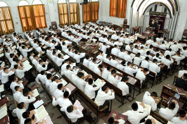 ראש הישיבה מוסר שיעור כללי